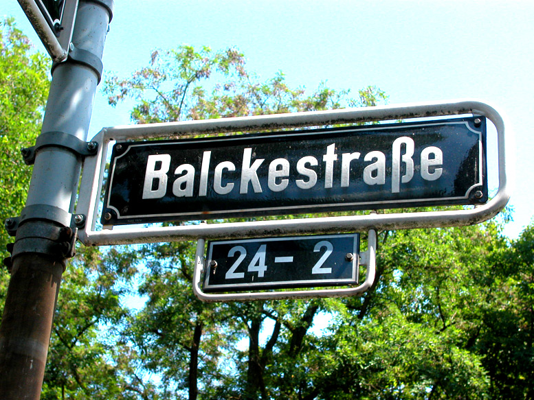 Die Straße «Balckestraße» in Benrath, Düsseldorf